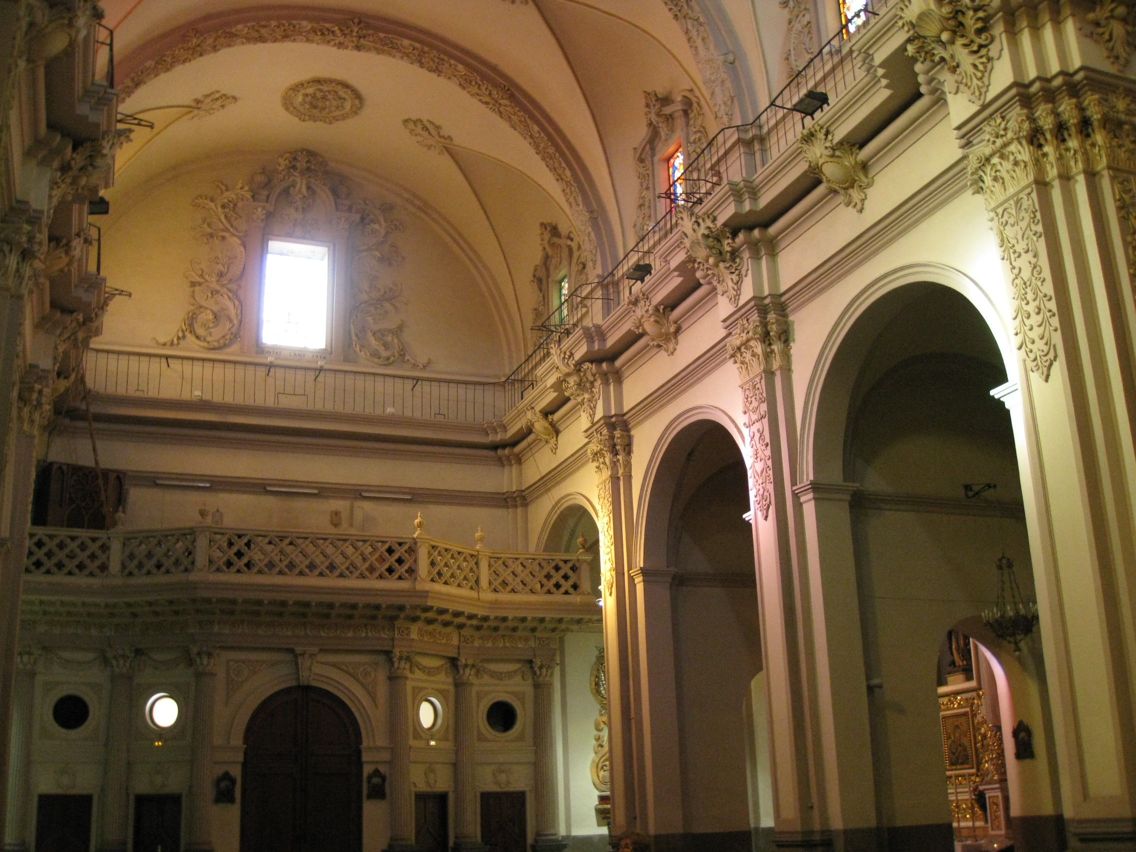 Església de l'Assumpció (Onda) 06.084-001.